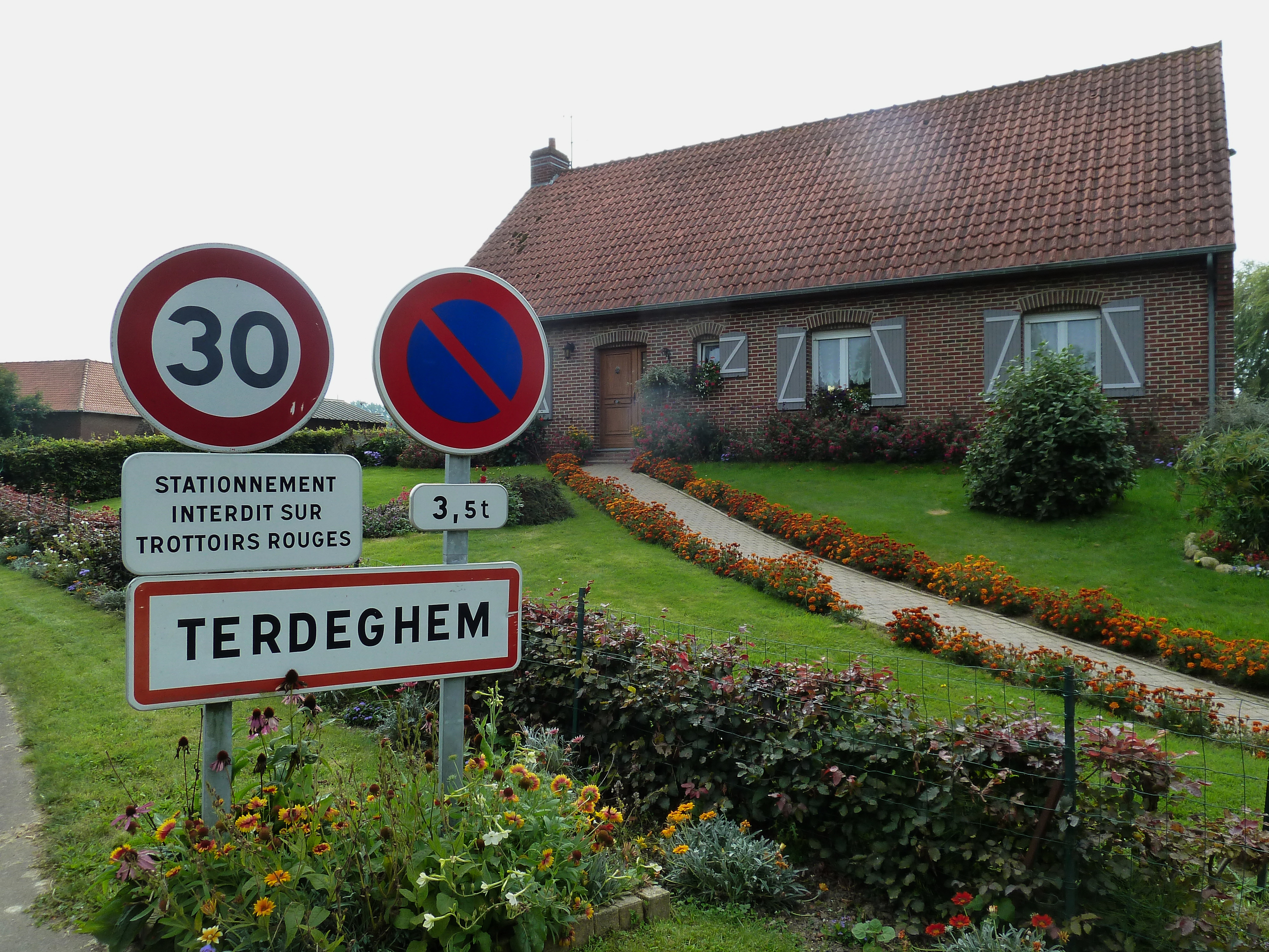 City limit de Terdeghem Nord, France